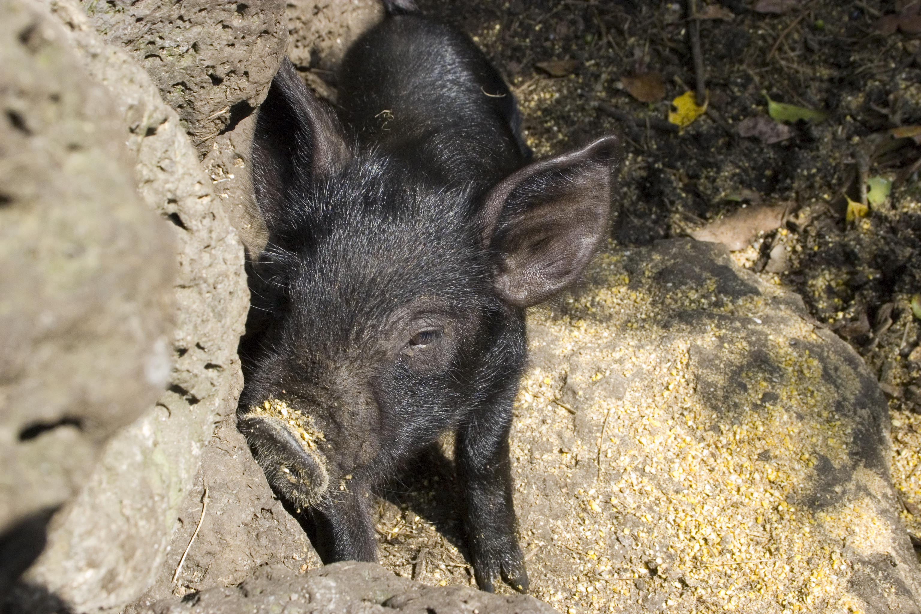 Jeju Black Pig